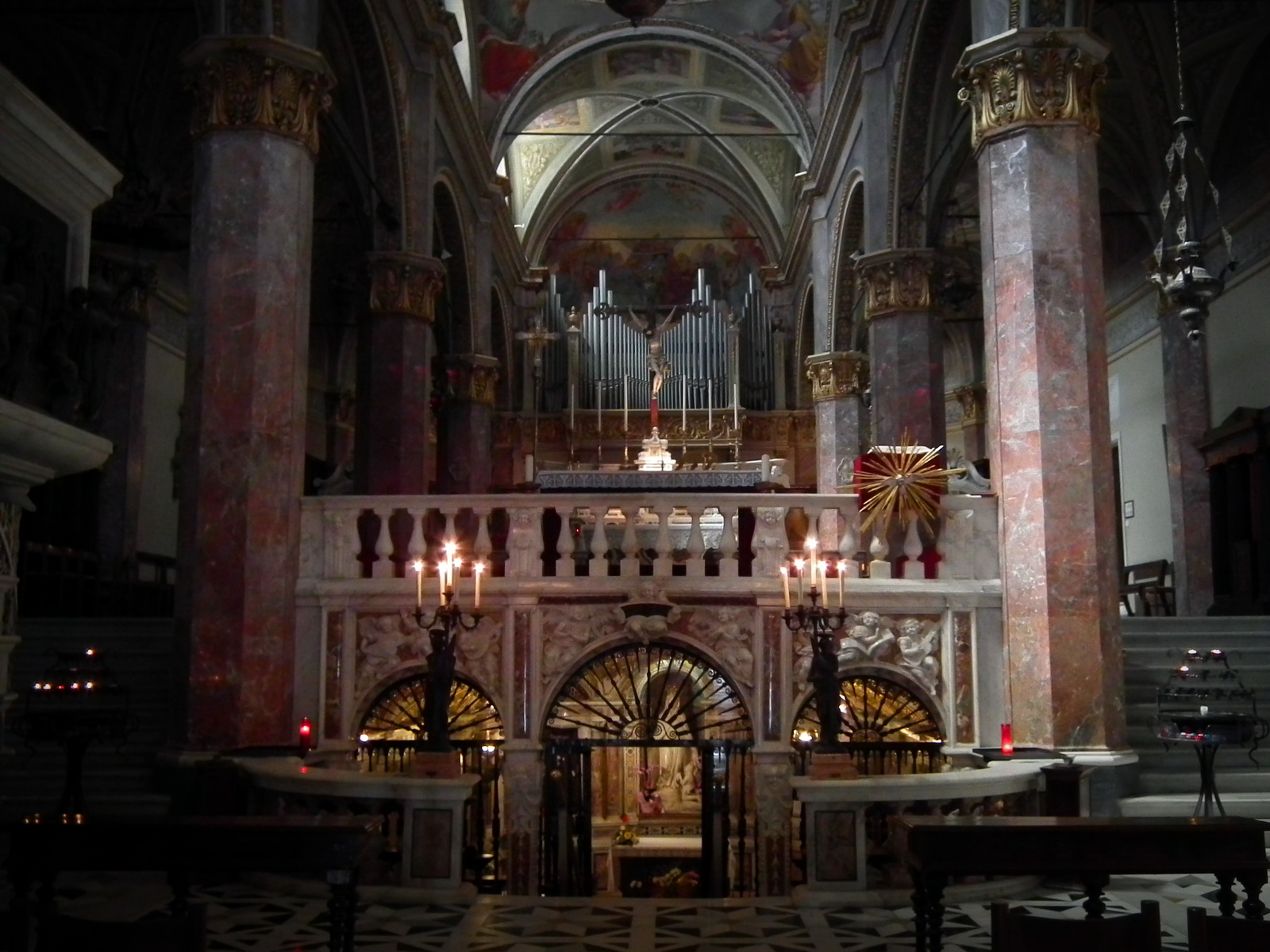 Sanctuary of Nostra Signora della Misericordia Native nameSantuario di Nostra Signora della MisericordiaLocationSavona, ItalyCoordinates44° 20′ 40.75″ N, 8° 26′ 02.93″ E Established1536 (Began construction)